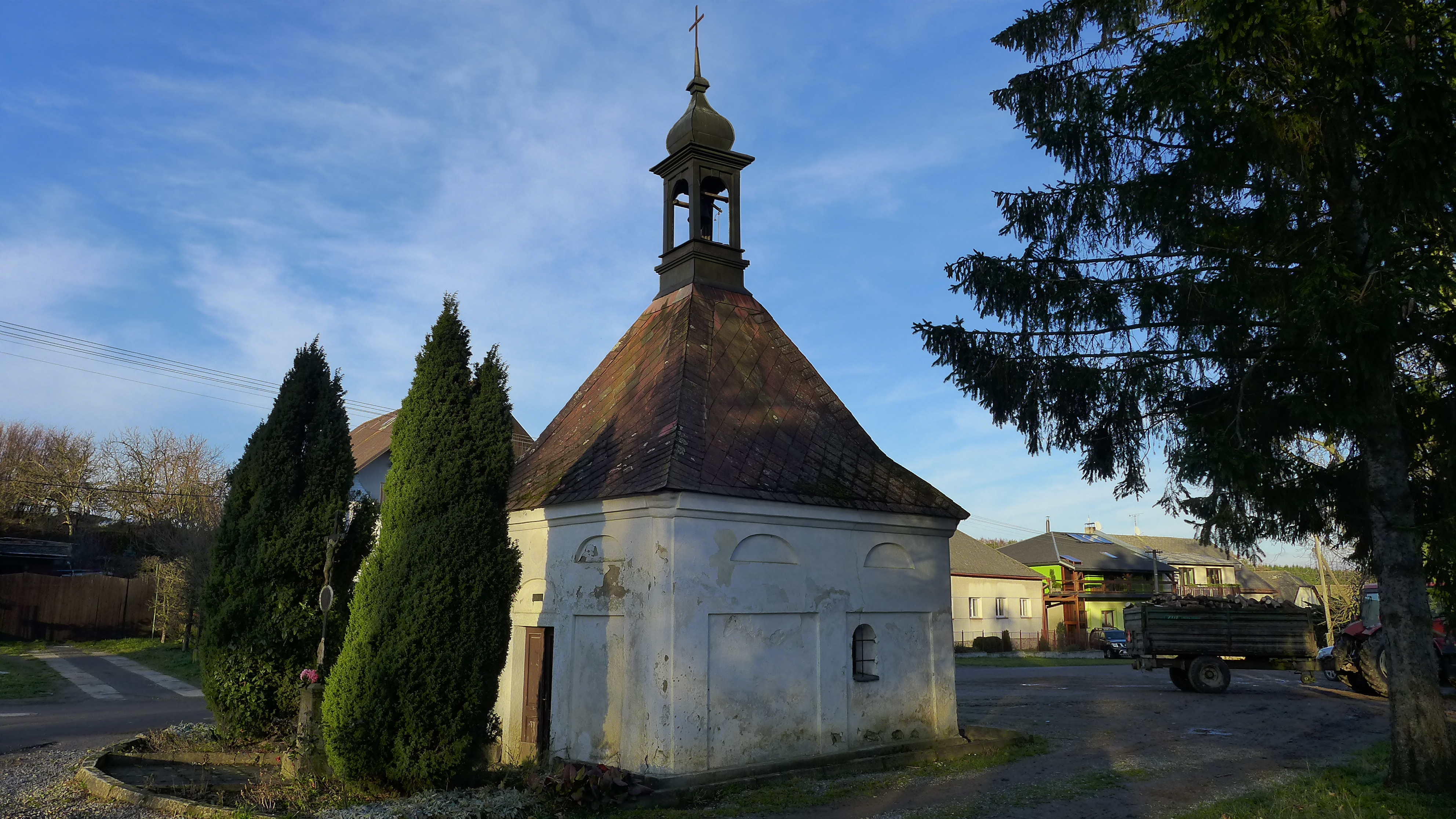 Kaple, náves, Studénky.